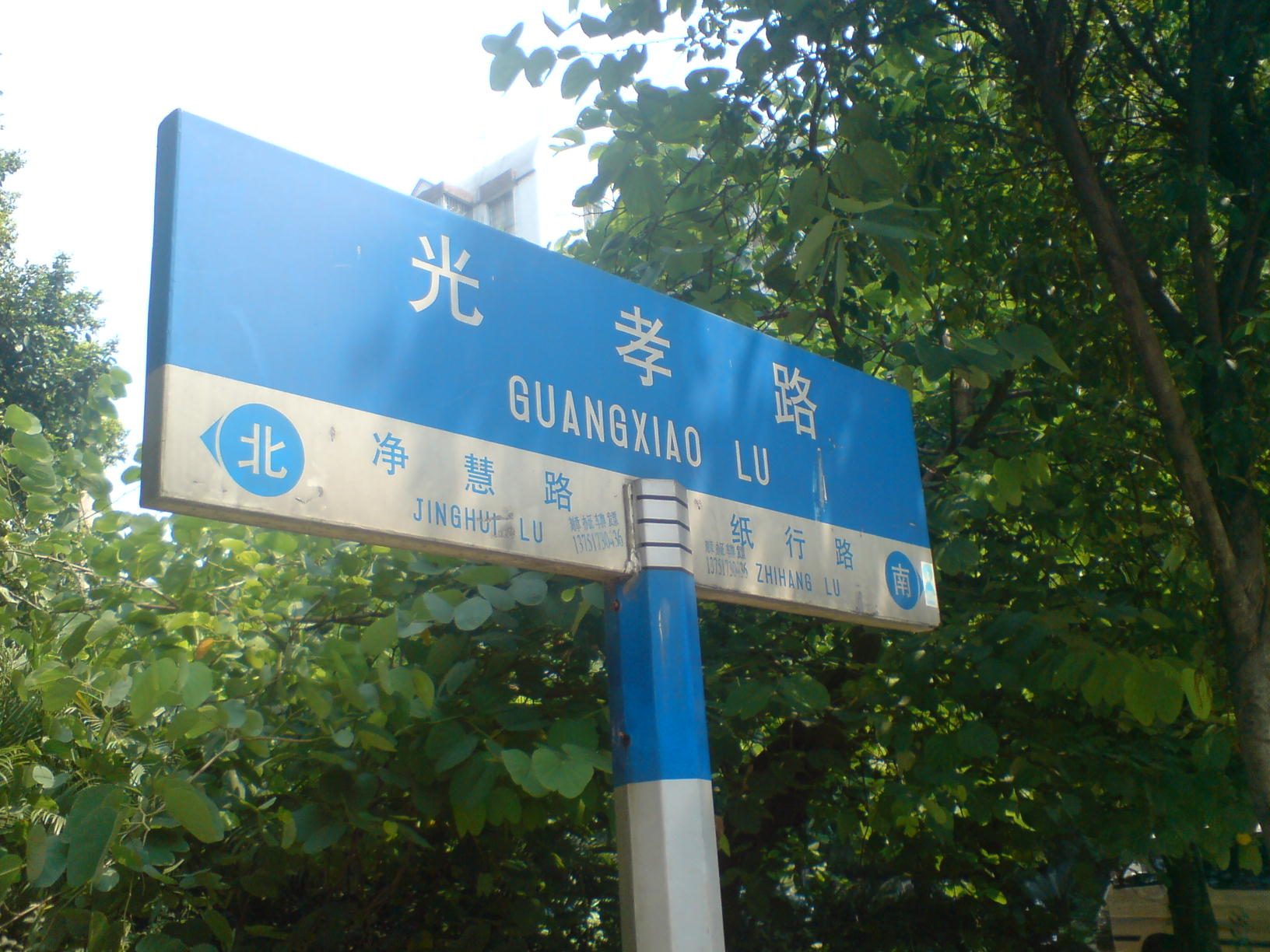 广州光孝路